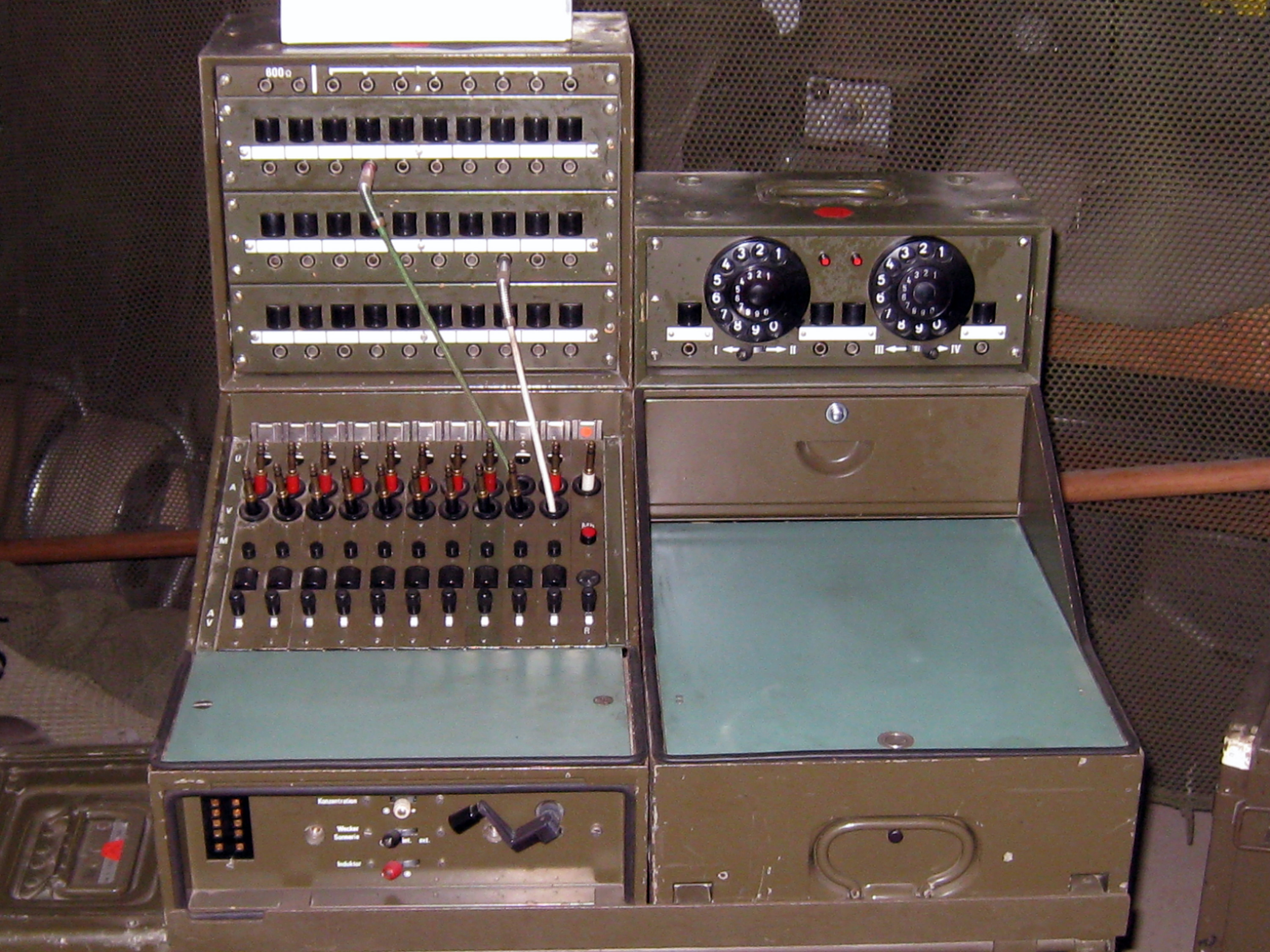 Telefonzentrale 64 der Schweizer Armee im Militärmuseum Full